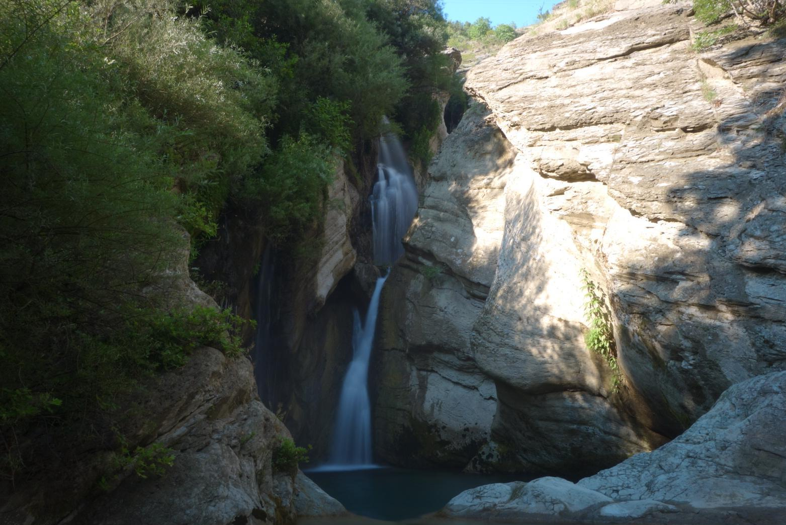 Ujëvara e Bogovës